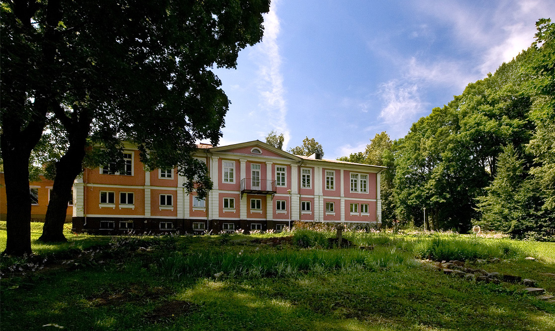 Stalgene manor house